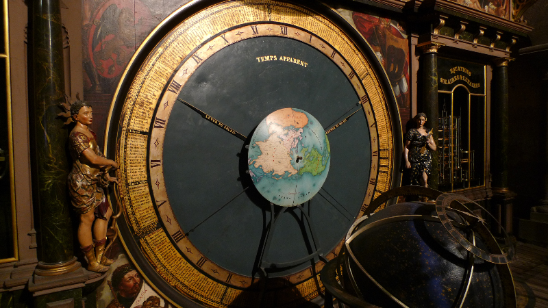 Detail Astronomische Uhr Straßburg Münster